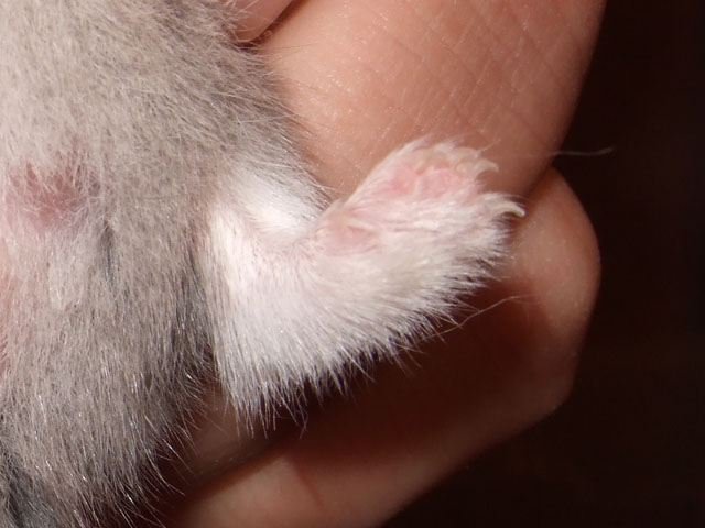 坎貝爾侏儒倉鼠的腳